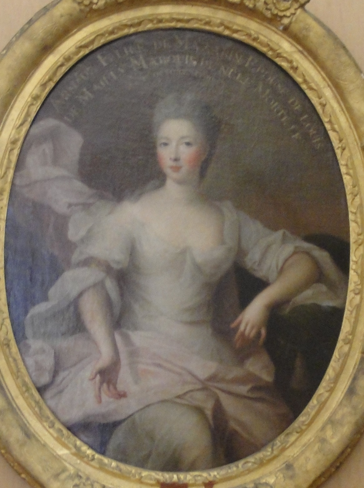 Armande Félice de Mazarin (1691-1729), huile sur toile (0,70 x 0,60 m), portrait d'abord à l’école de Nattier puis à Pierre Gobert.